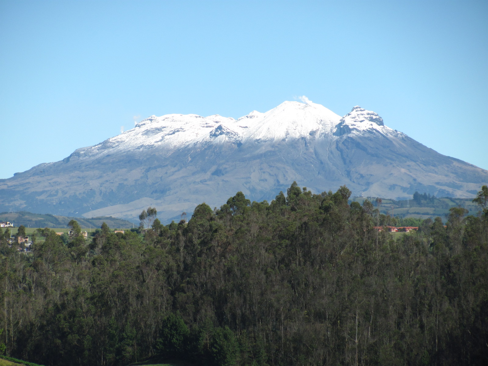 Nevado de Cumbal,Nariño, Colombia